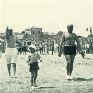 Benito Mussolini con il figlio Romano sulla spiaggia di Riccione nel 1932.